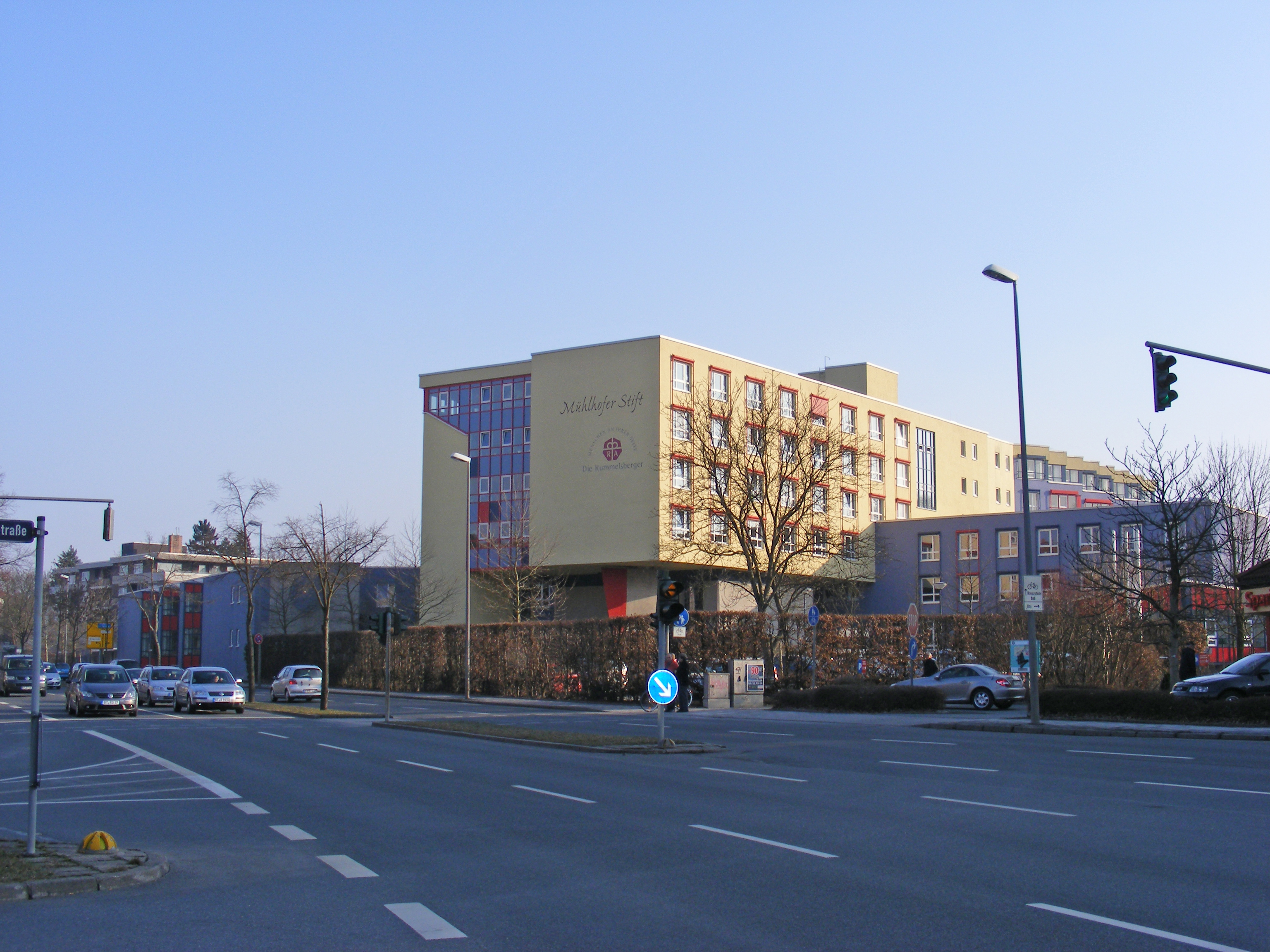 Bayreuth, Wittelsbacherring und Friedrichstraße, Außenansicht; im Vordergrund links: Verkehrsschildkröte auf Verkehrsinsel